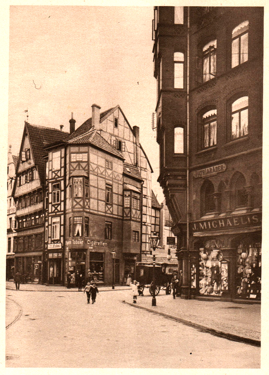 Punktgeraster Abdruck einer Fotografie von Karl F. Wunder oder Friedrich Astholz junior aus dem 1913 durch den Niederländer Dirk Jan van der Ven herausgegebenen Bildband „Hannover in Panorama“ hier der Blick auf das laut dem Untertitel „das kleinste Haus [in Hannover]“ an der Ebhardtstraße Ecke Breite Straße ...